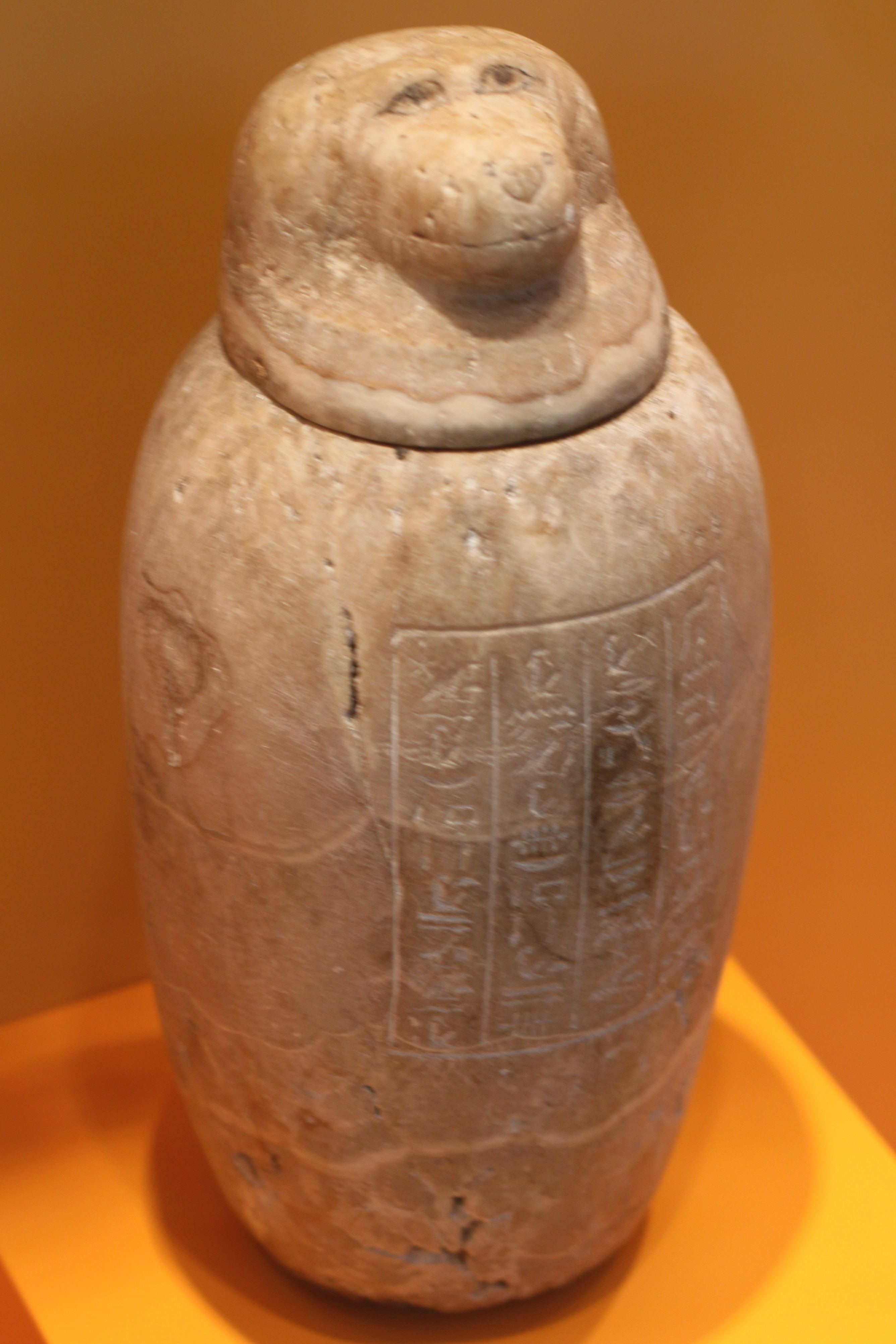 Kanope Altägypten 26. Dynastie oder später; Sammlung Junkelmann; 1926; zur getrennten Beisetzung der Eingeweise; Inschrift: Rnpft-nfrt (Renepet-nefret) - ein Privatname; im Überseemuseum